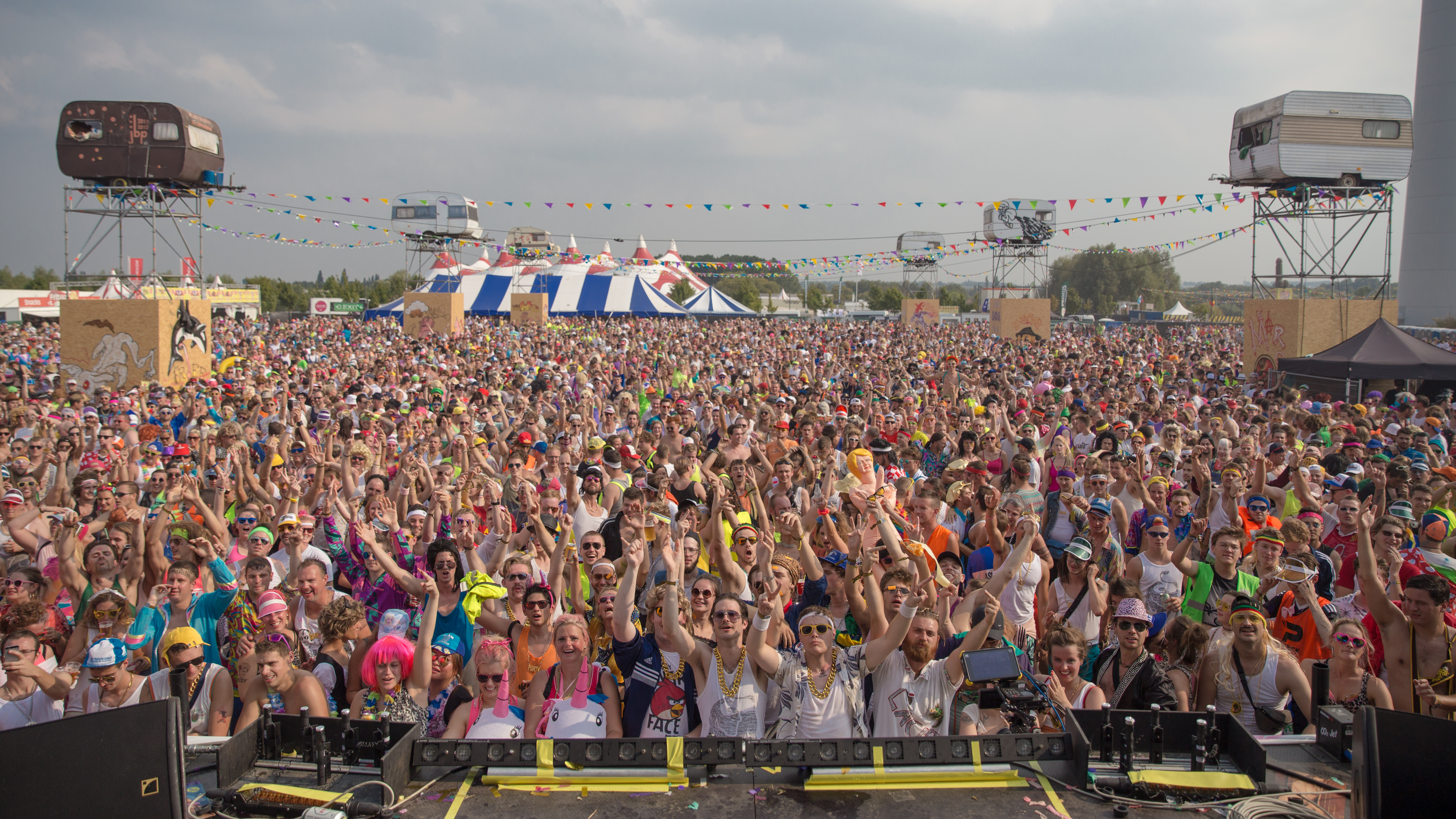 Duizenden bezoekers van Kamping Kitsch Club 2017 staan voor de 'Mijn Stage', het hoofdpodium van het festival